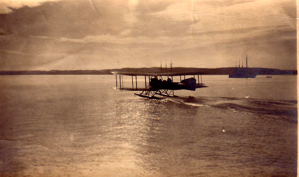 Marine Doppeldecker Typ Friedrichshafen FF49C startet zur Aufklärung